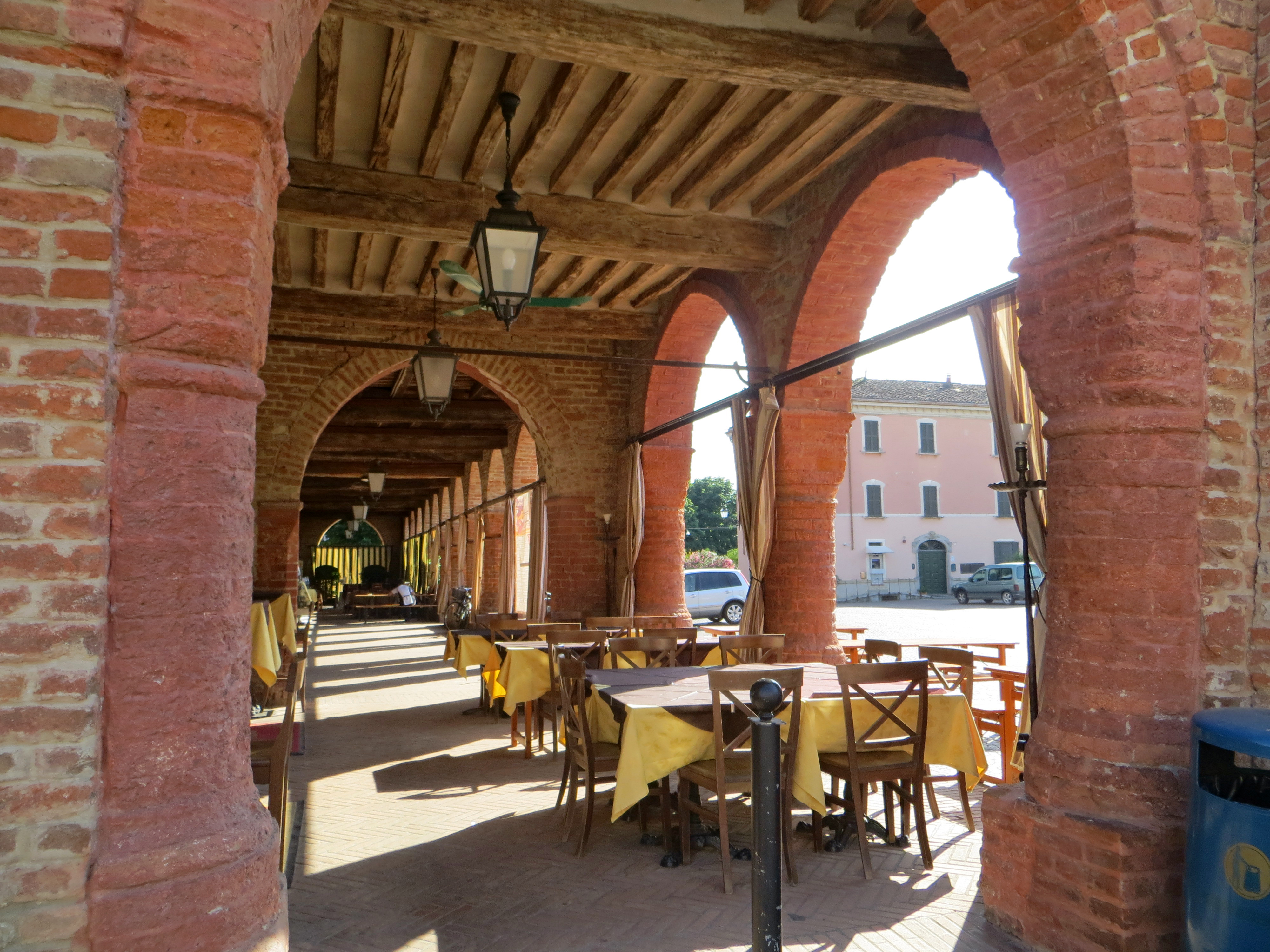 Palazzo Pallavicino (Zibello) - porticato